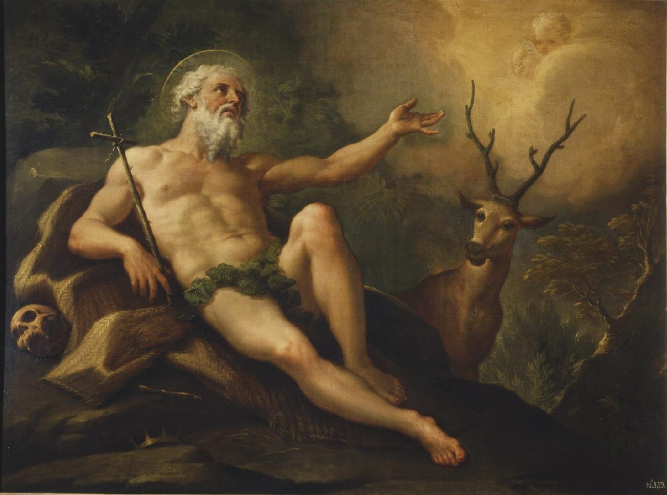 La obra representa al monje benedictino Gil de Casaio en actitud penitente.